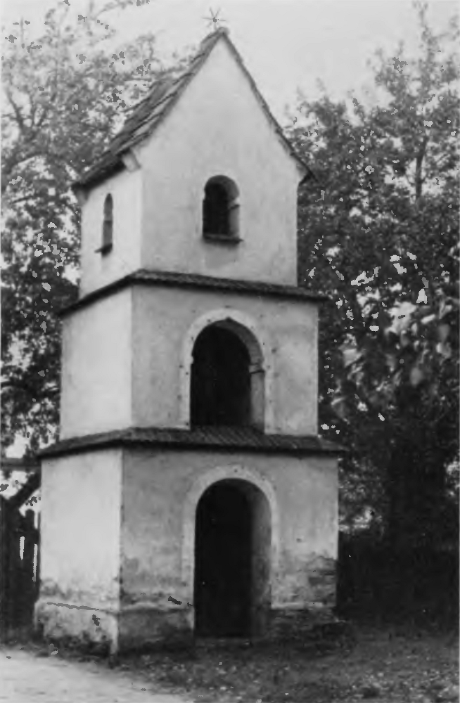 Glockenturm in Wengern im Kreis Oppeln in Oberschlesien. Erbaut Mitte des 19. Jahrhunderts.